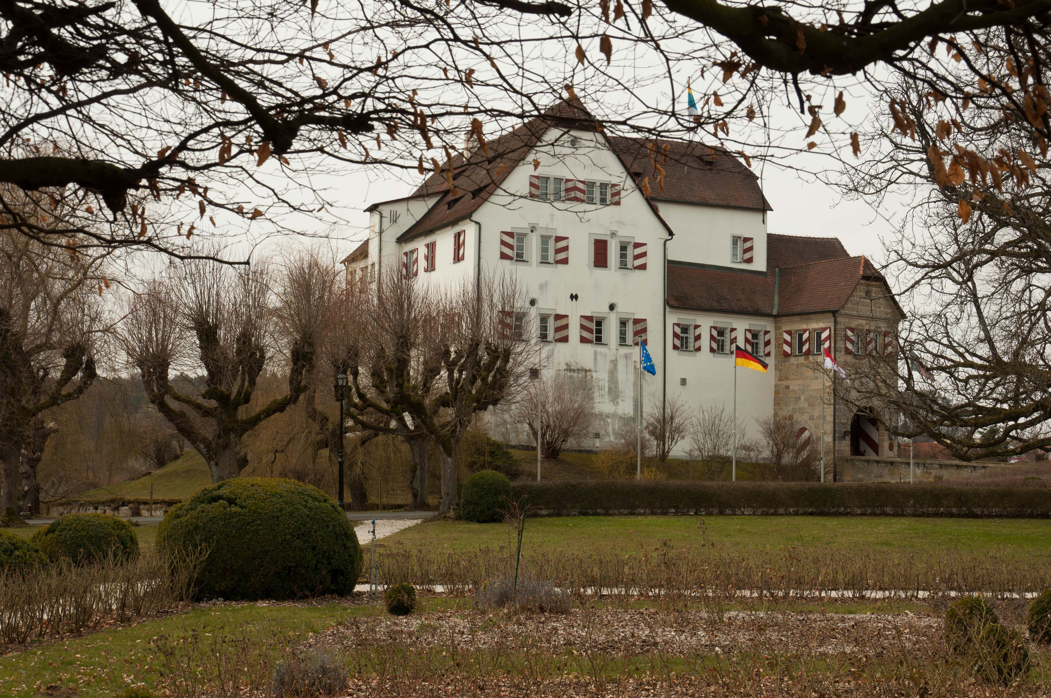 Burg Henfenfeld